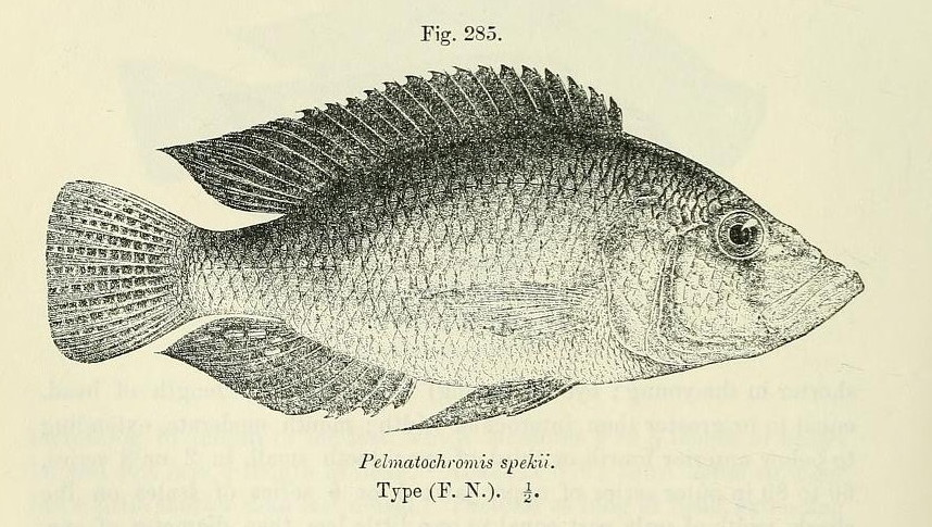 Haplochromis spekii